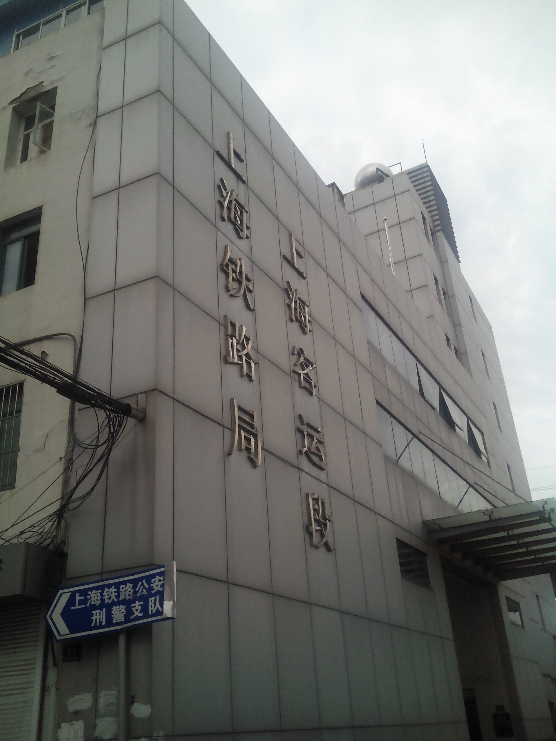 201408上海客运段